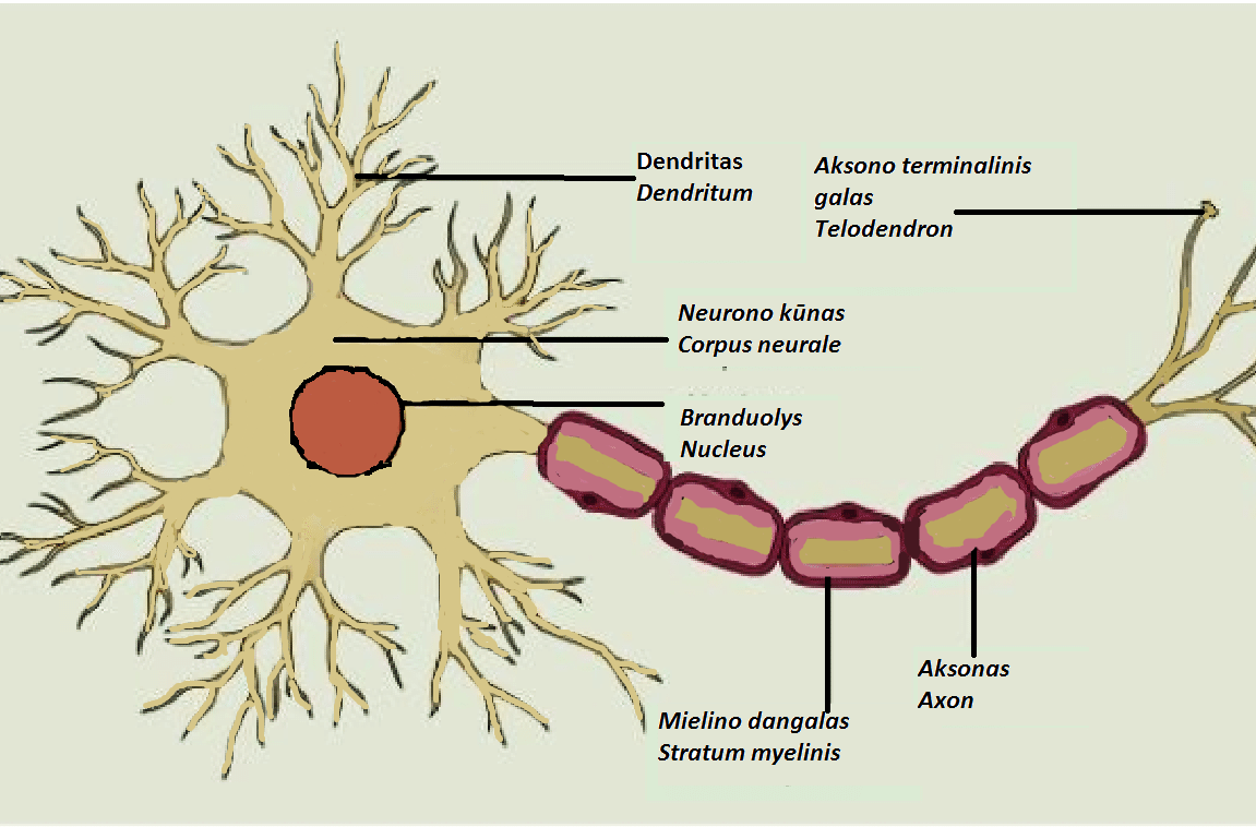 Neurono sandara